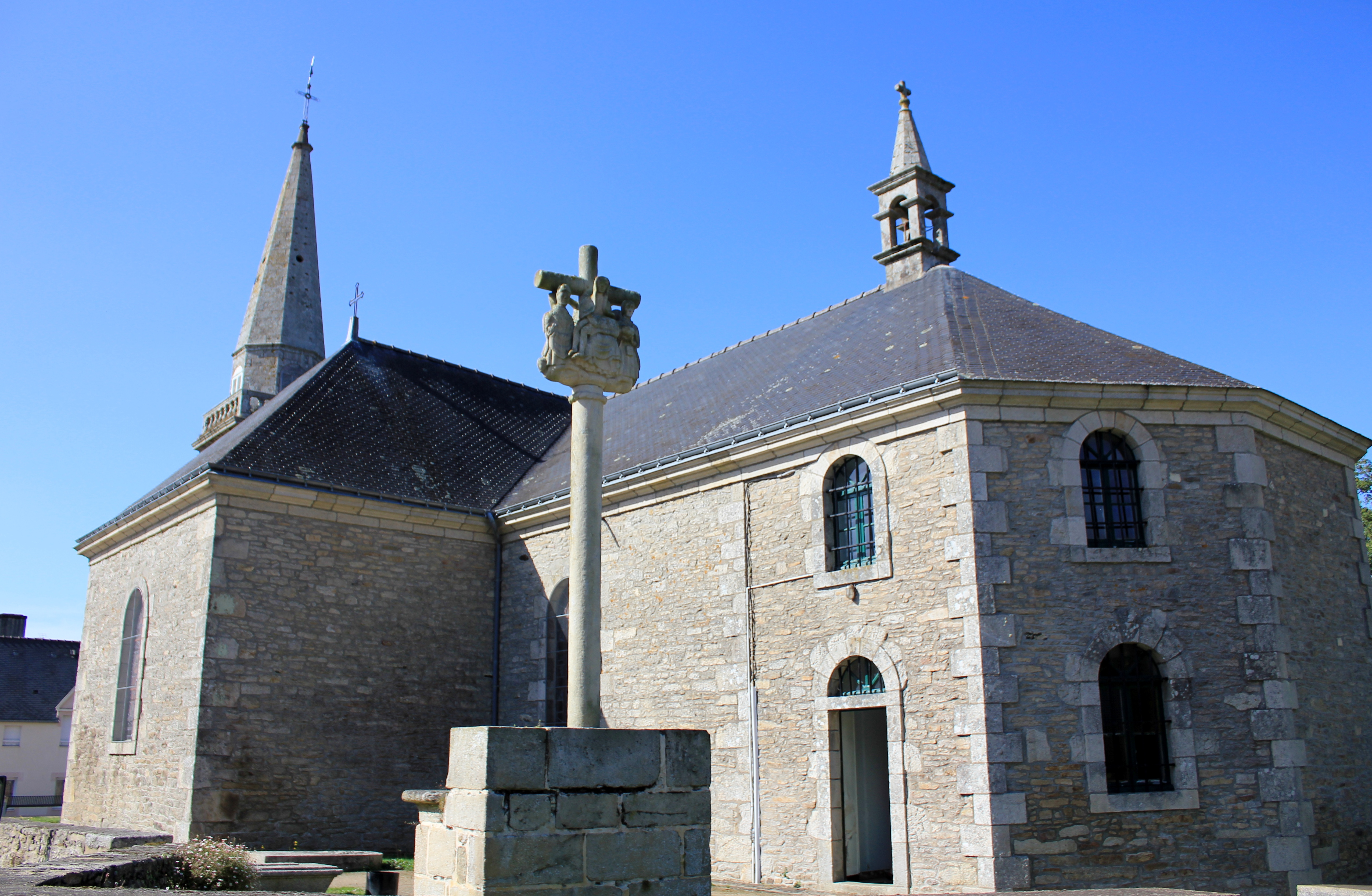 Église Saint-Arnould à Saint-Allouestre, Morbihan, France. Vue sud-est de l'église.